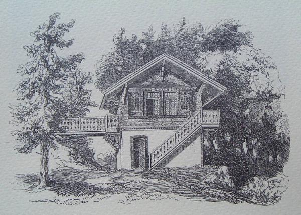 Lo Chalet svizzero dentro Villa Ghirlanda Silva, a Cinisello.